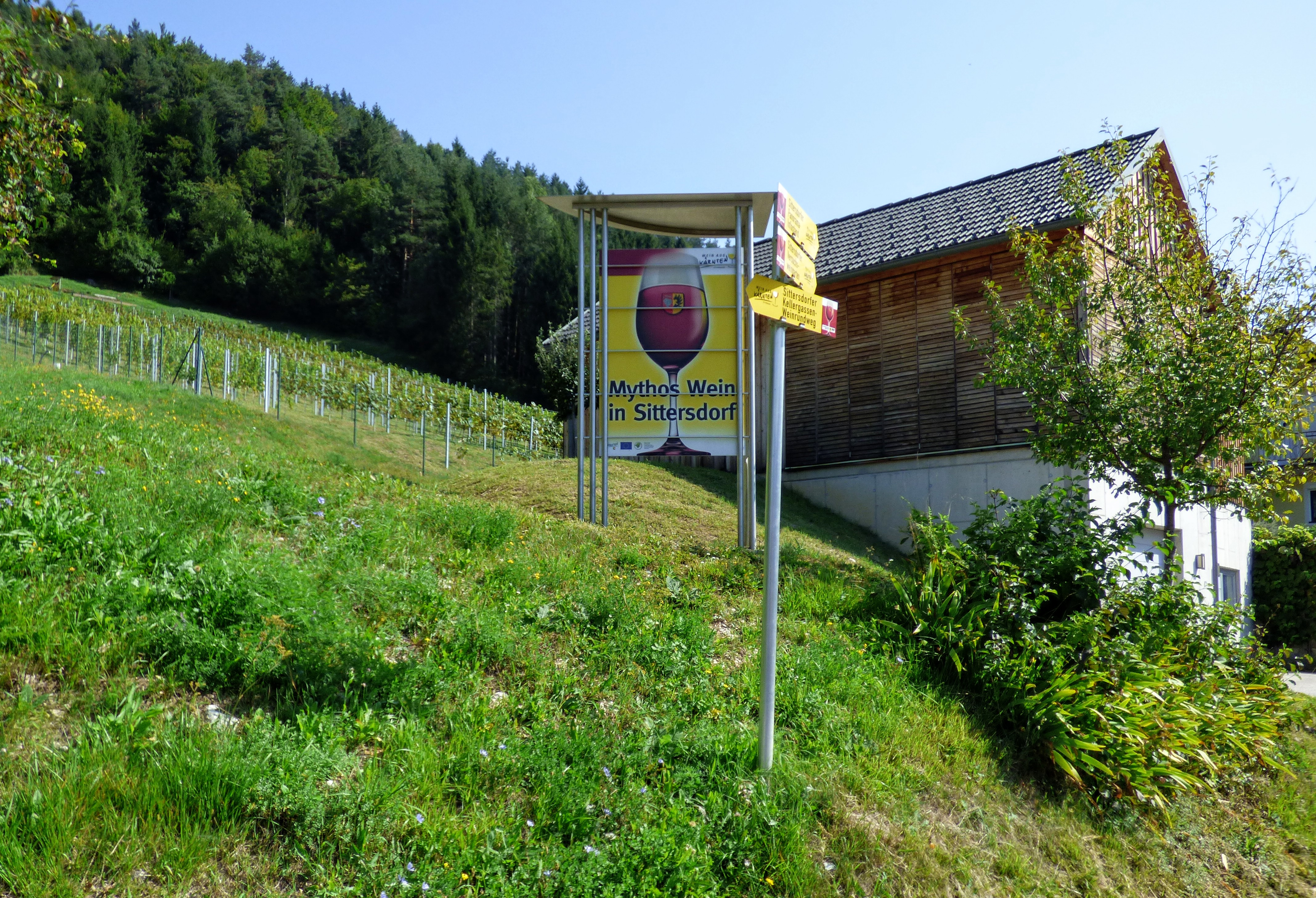 Weinberg Sittersdorf, Kärnten; Wirtschaftsgebäude unterhalb Weingarten neben Haus Nr. 31